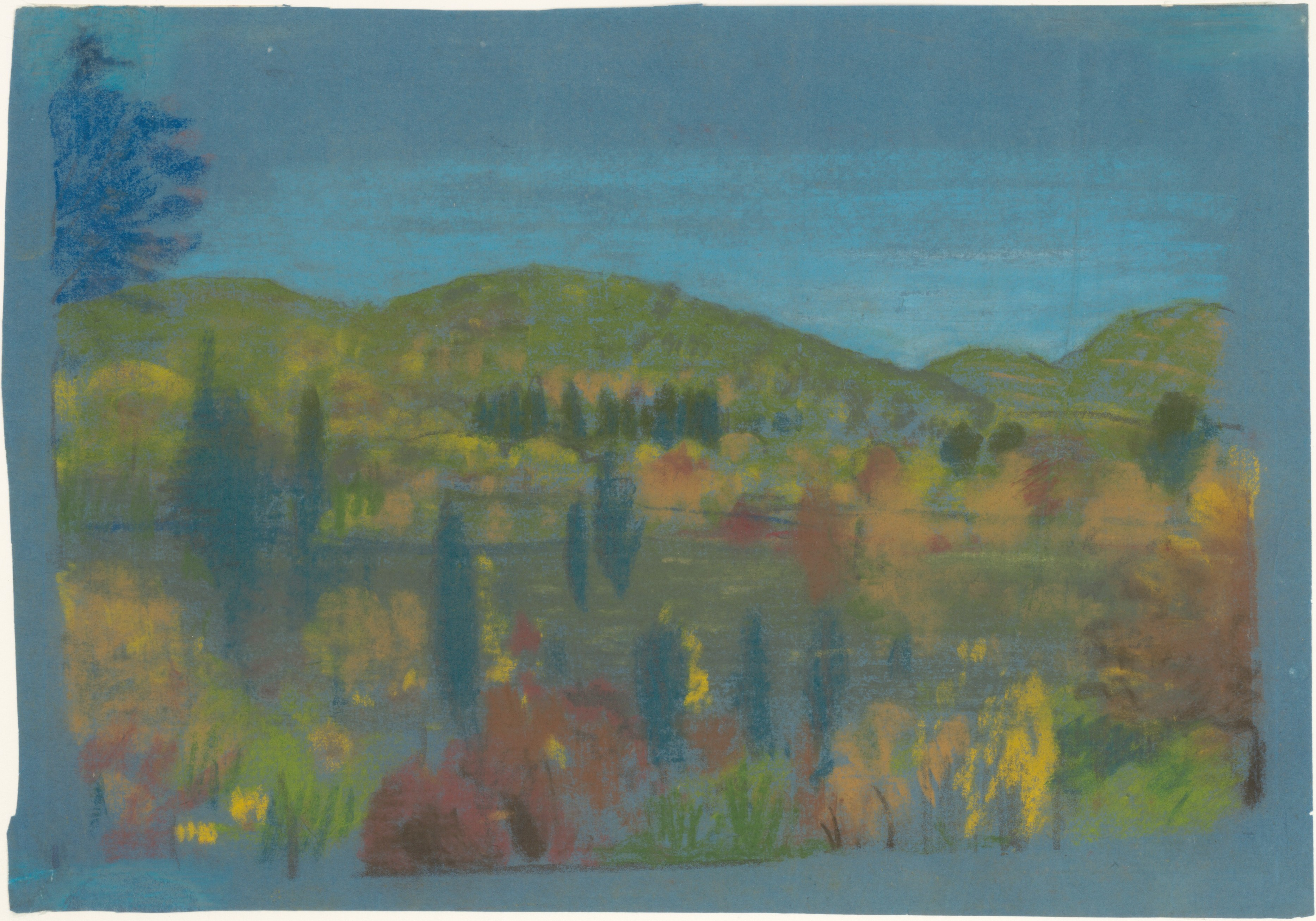 Drawing; Drawings